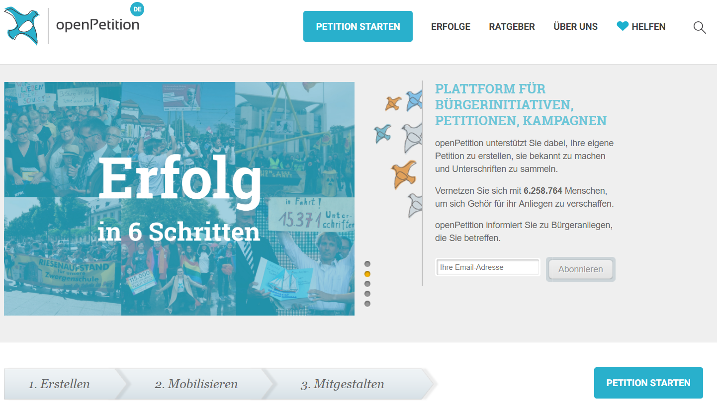 Screenshot der Petitionsplattform